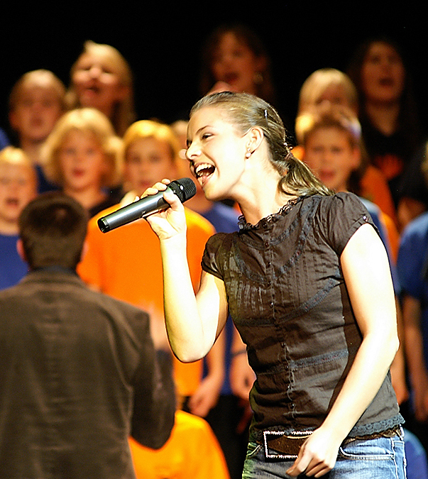 Florence Joy on a gospel concert